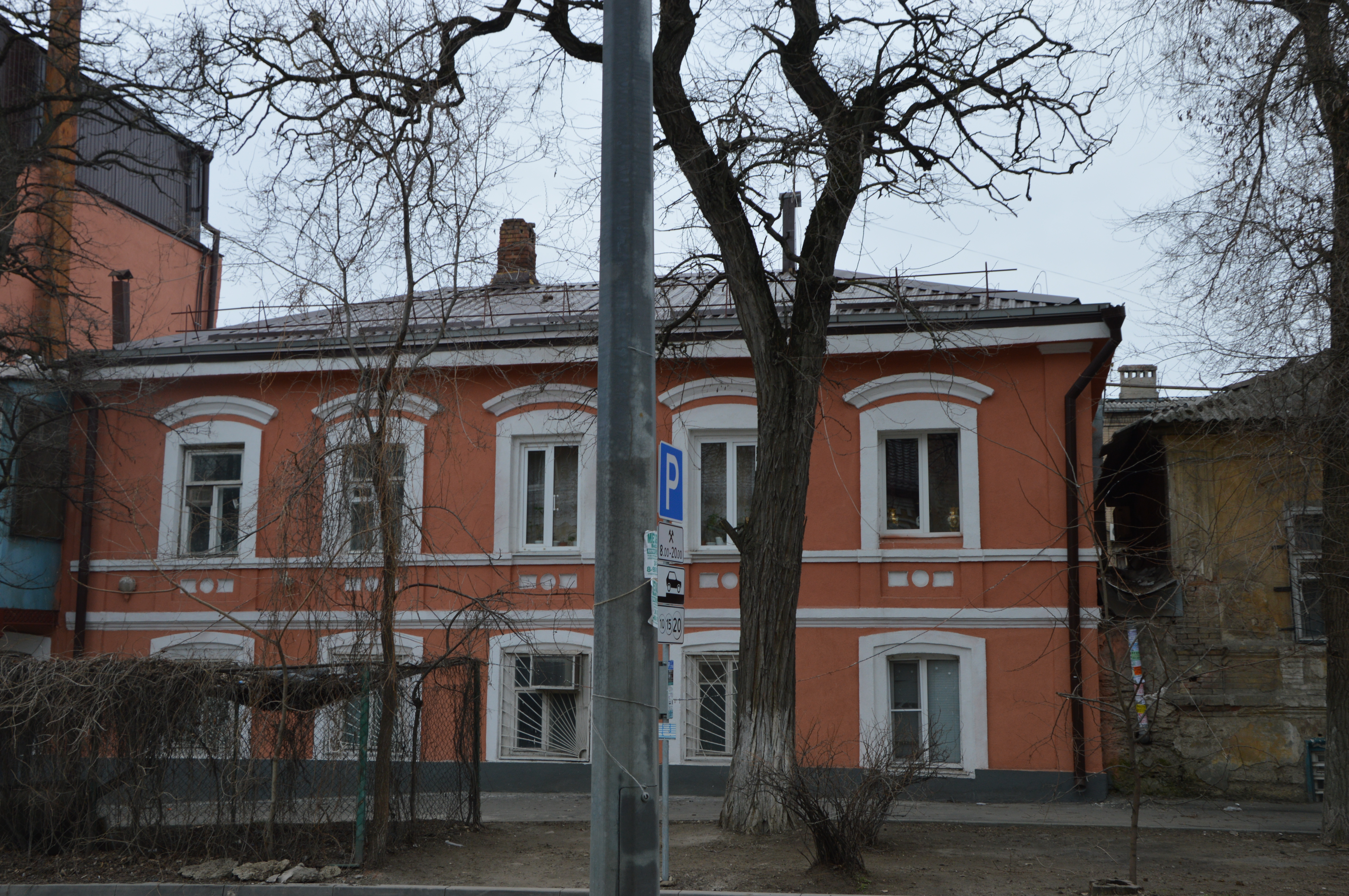 Здание города Ростова-на-Дону